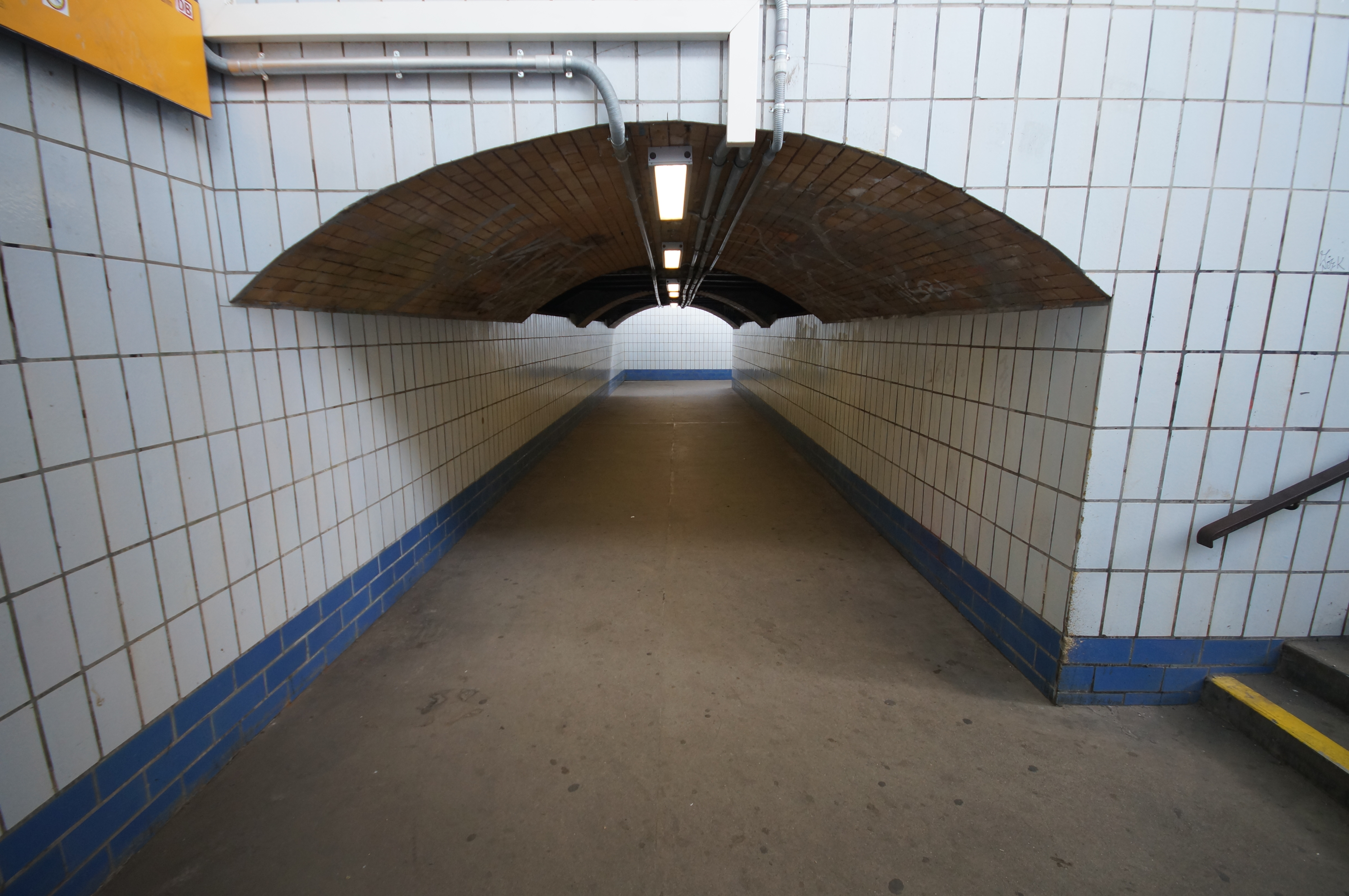 Die Fußgängerunterführung im Bahnhof Königs Wusterhausen